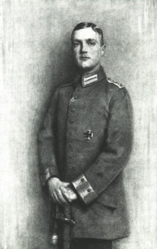 Bildnis des Kronprinzen Georg von Sachsen